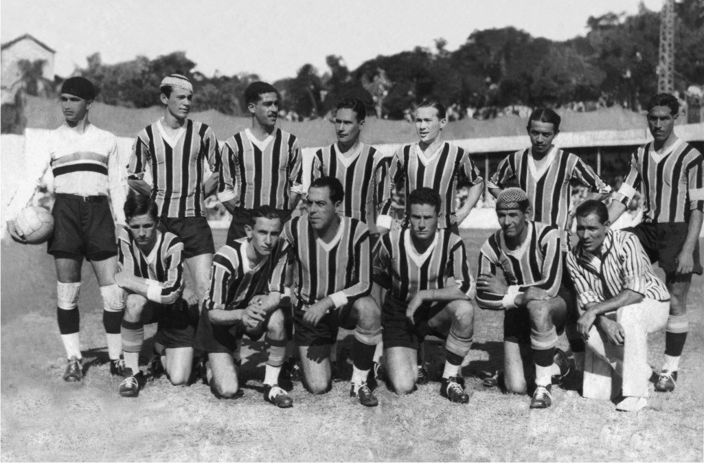 Grêmio erguia seu 15º título, fazendo 5 a 3 sobre o Inter, na Baixada.